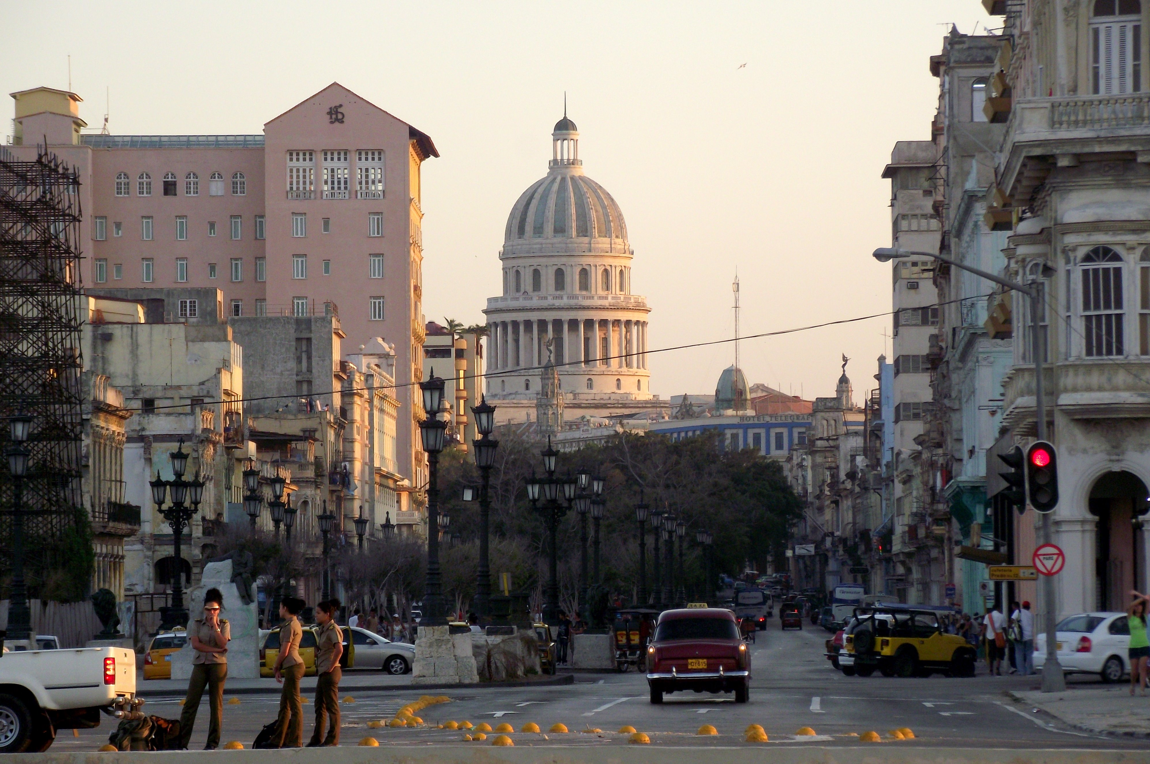 Paseo del Prado visto desde la explanada del castillo de La Punta a la entrada de la bahía habanera, se observa al fondo el capitolio